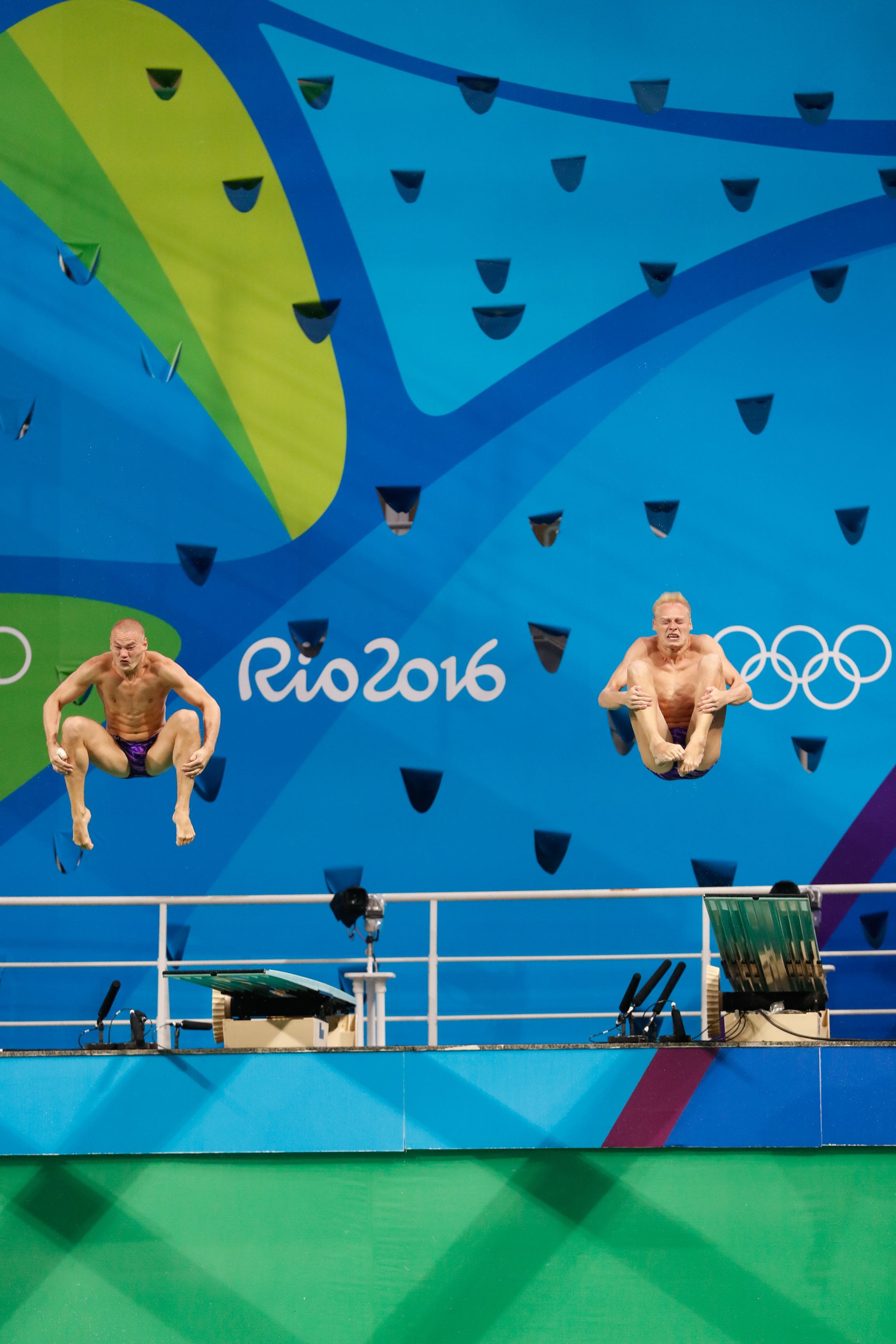 Rio de Janeiro - Russos Evegenil Kuznetov e Ilia Zakharov competem no trampolim de 3 metros sincronizado dos saltos ornamentais nos Jogos Olímpicos Rio 2016, no Parque Aquático Maria Lenk (Fernando Frazão/Agência Brasil)